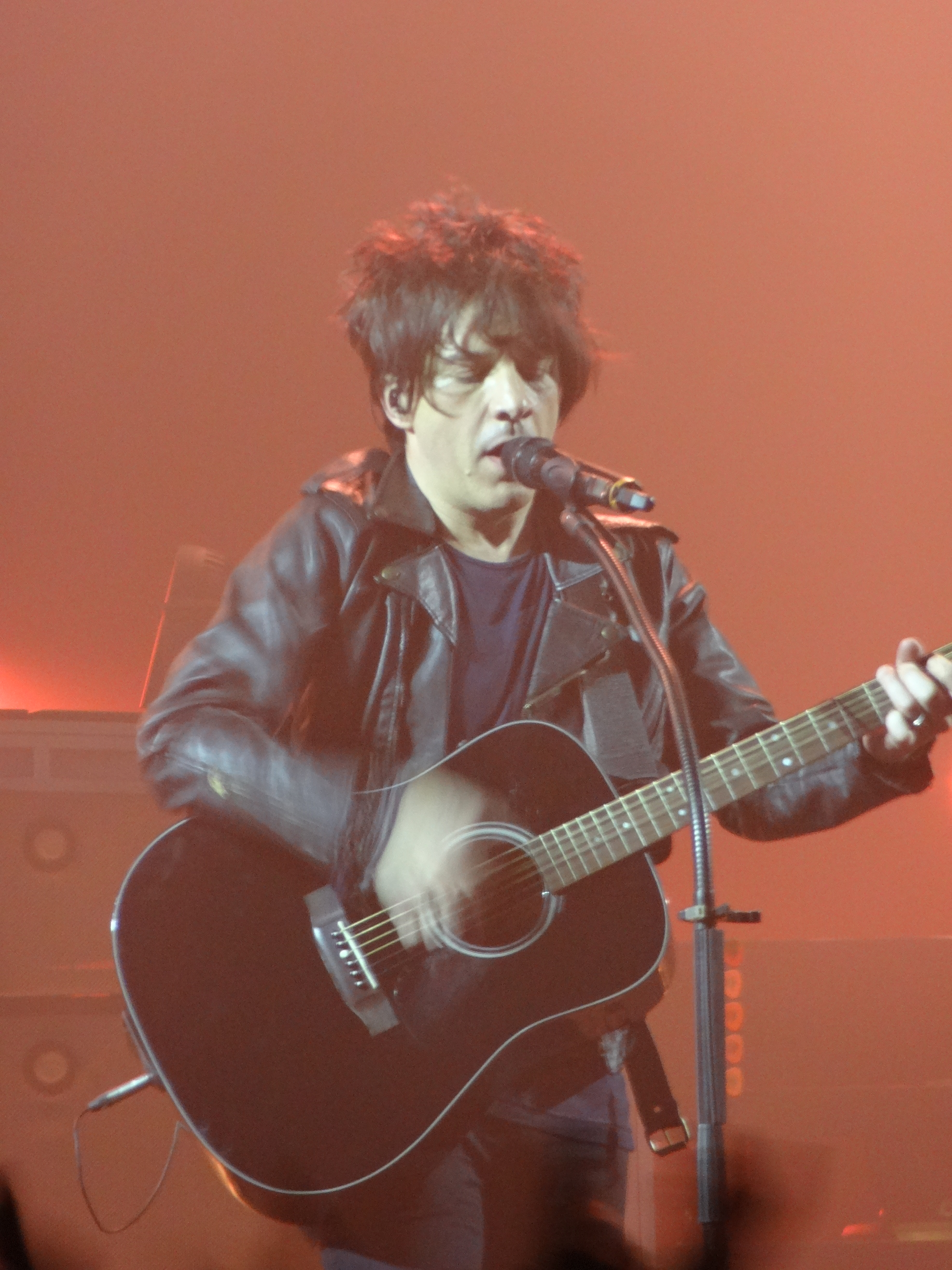 Nicola Sirkis lors du concert d'Indochine à Brest le 23 mars 2013